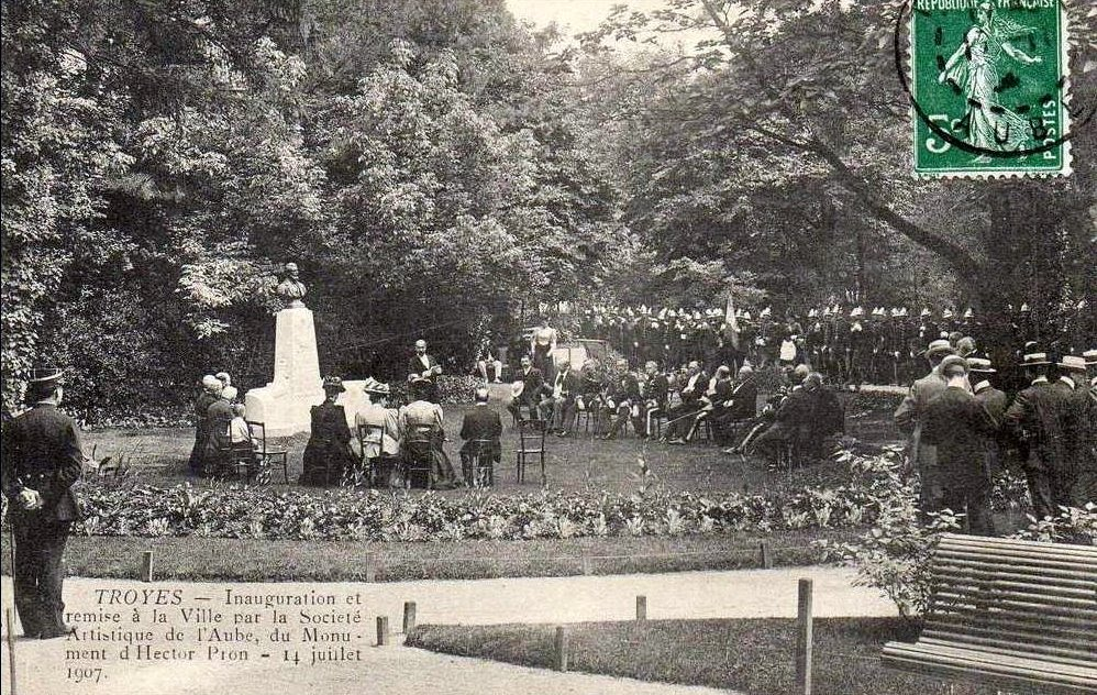 14 juillet 1907 Inauguration du monument Hector PRON, né à Sézanne en 1817 et mort à Troyes en 1902. Le buste d'Hector PRON est encore visible dans le jardin de Chevreuse.